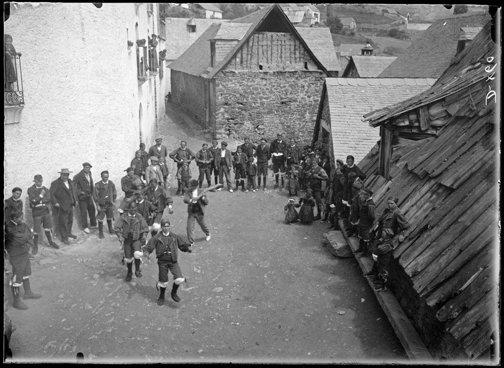 Imatge